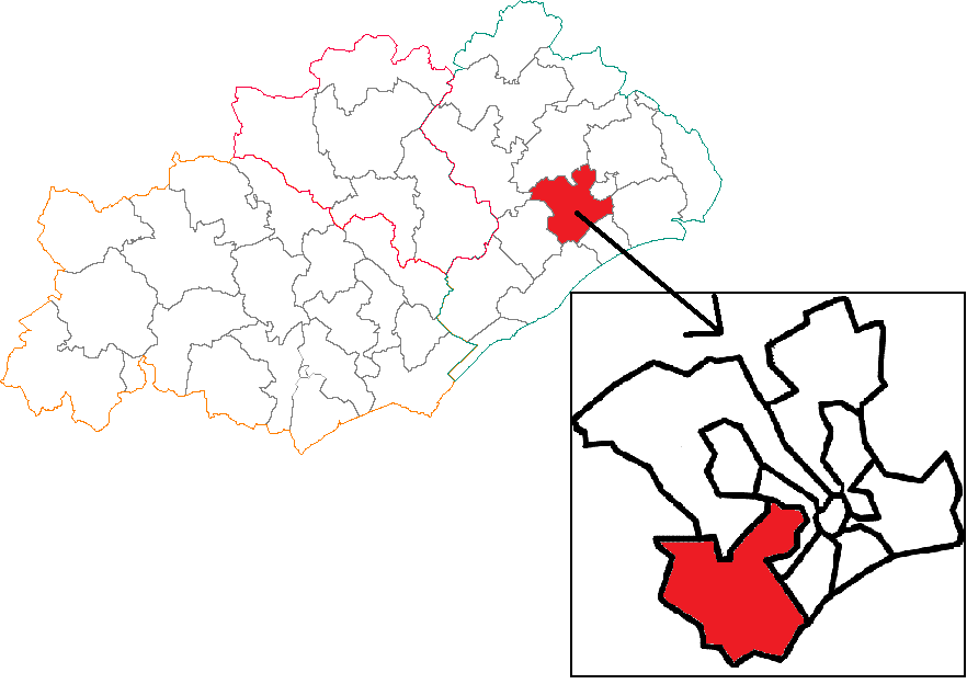 Situation du canton dans le département de l'Hérault.